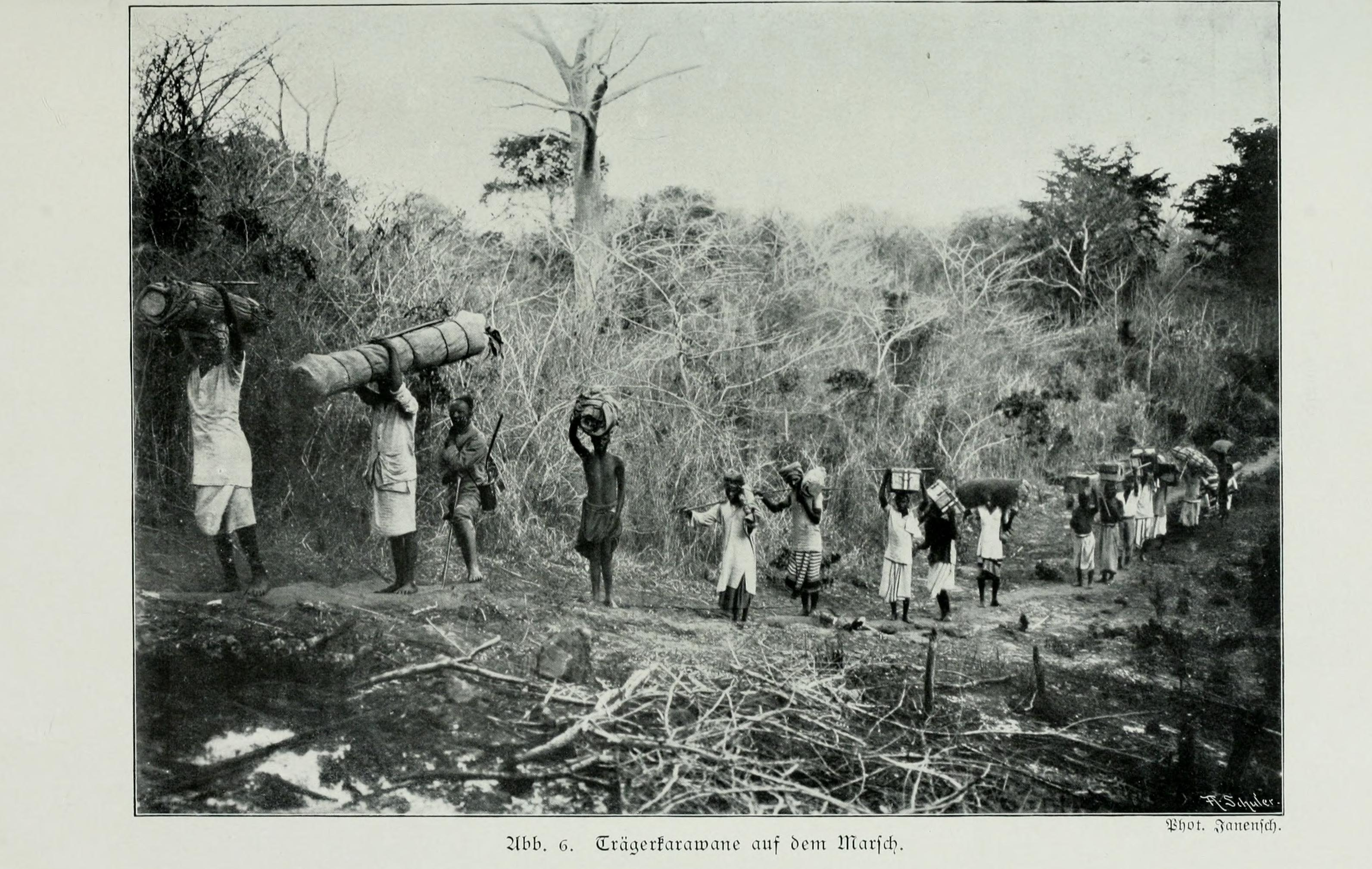 Am Tendaguru : Leben und Wirken einer deutschen Forschungsexpedition zur Ausgrabung vorweltlicher Riesensaurier in Deutsch-Ostafrika / von Edw. Hennig ; mit 62 Abbildungen im Text, 8 schwarzen, 1 farbigen Tafel und 1 Kartenskizze.